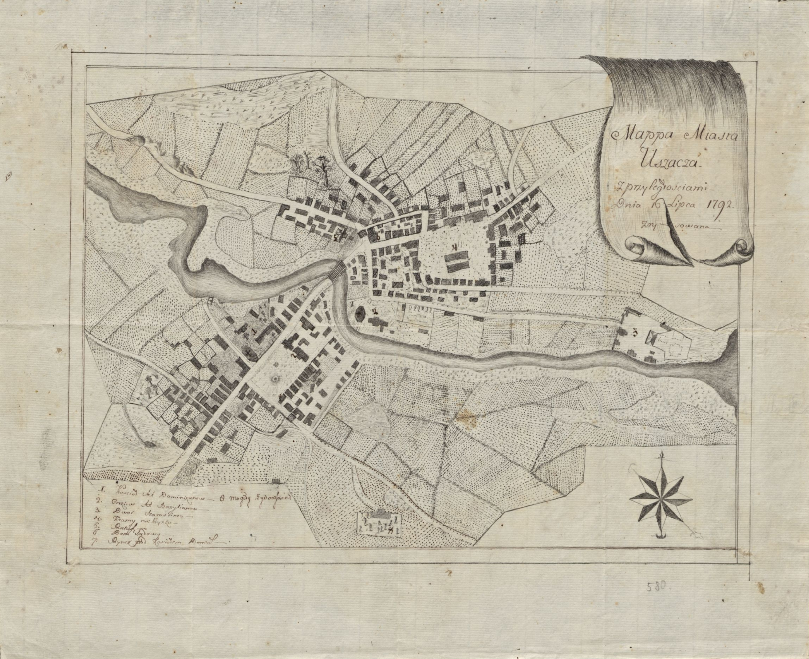 Беларуская (тарашкевіца): Ушачы (Ušačy). Плян